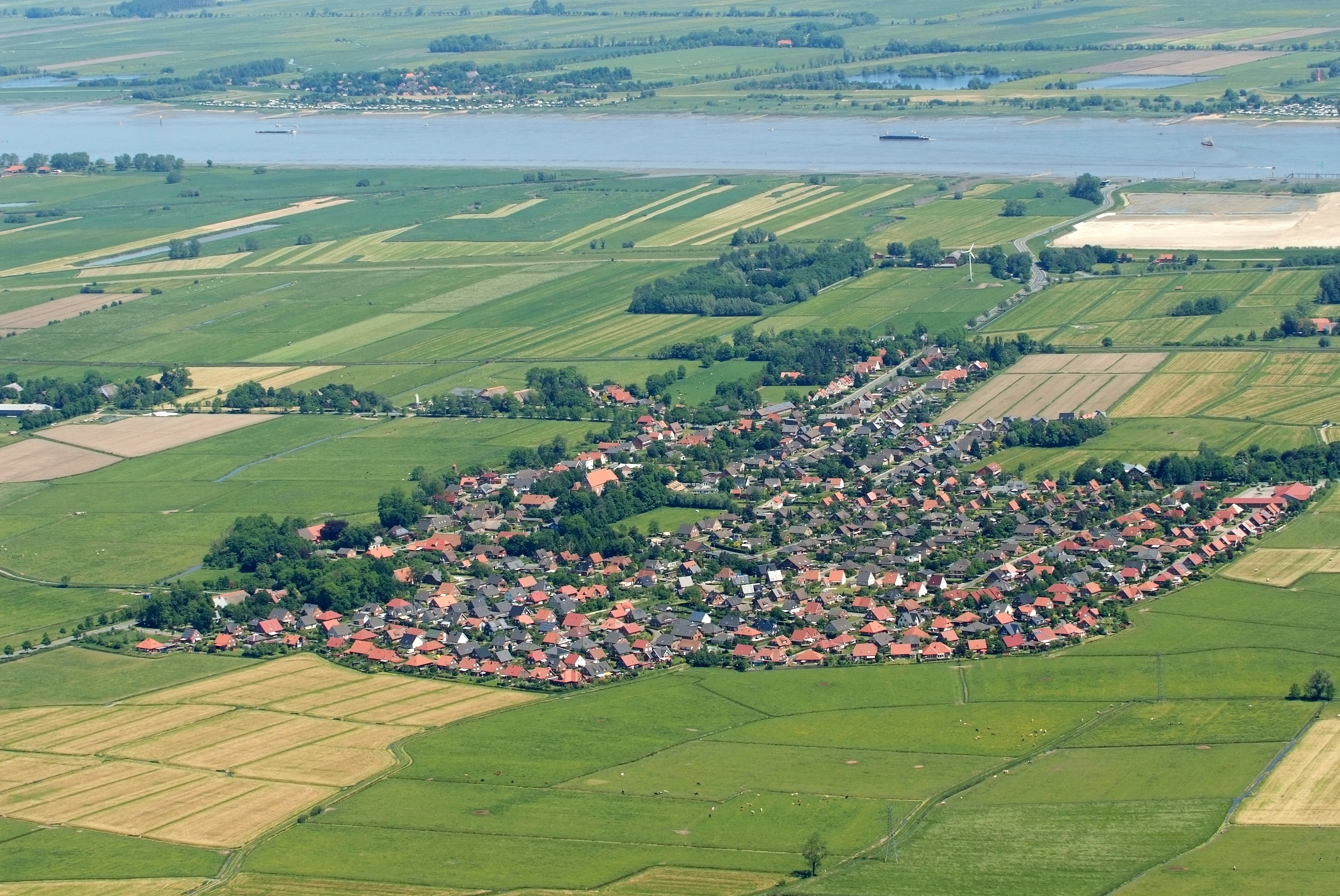 Golzwarden bei Brake Fotoflug vom Flugplatz Nordholz-Spieka über Cuxhaven und Wilhelmshaven